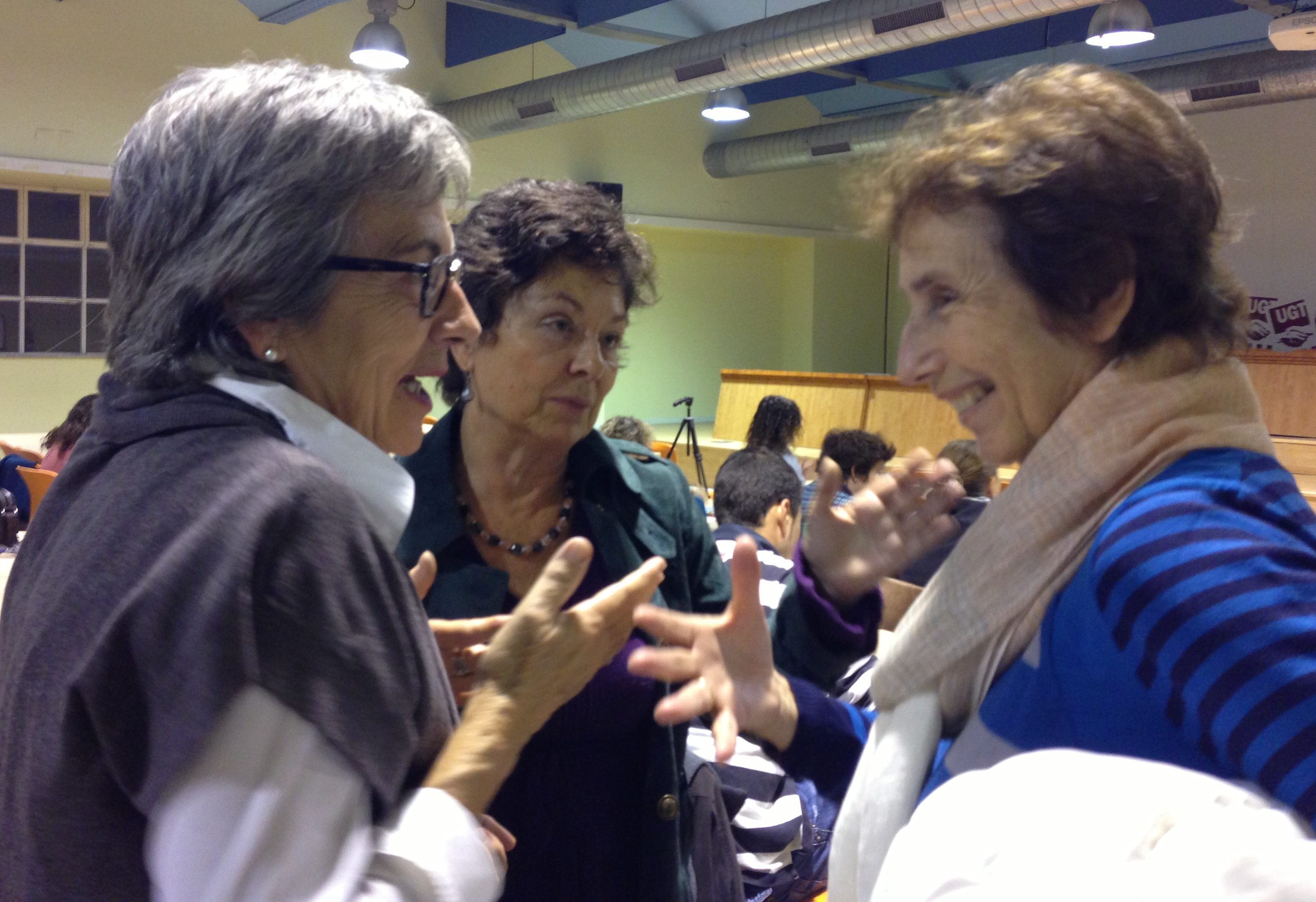 Jornadas de Coeducación en UGT Cataluña. Barcelona